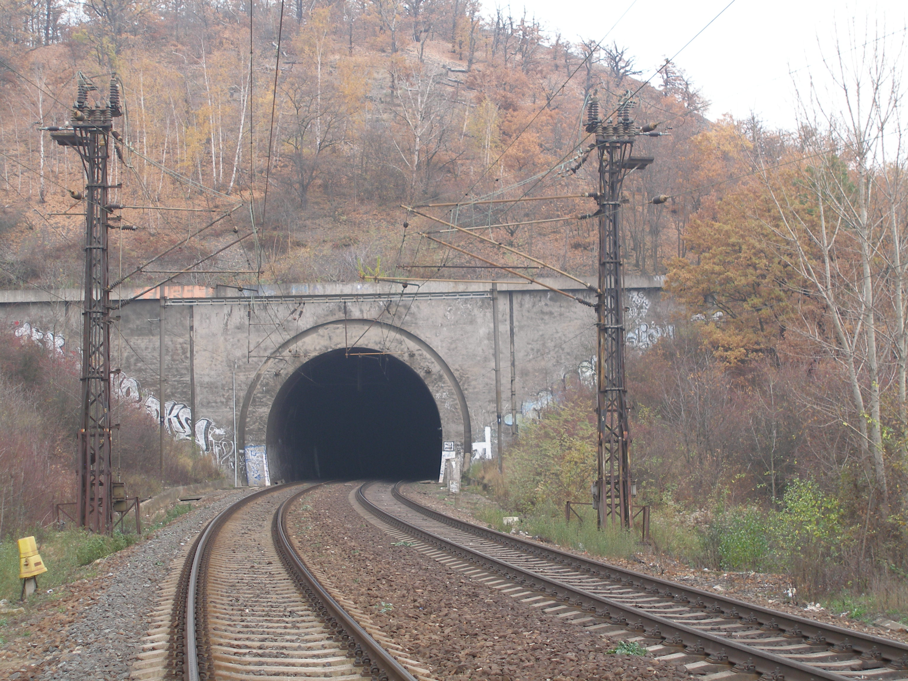 Jihozápadní portál železničního tunela pod Bílou skálou.